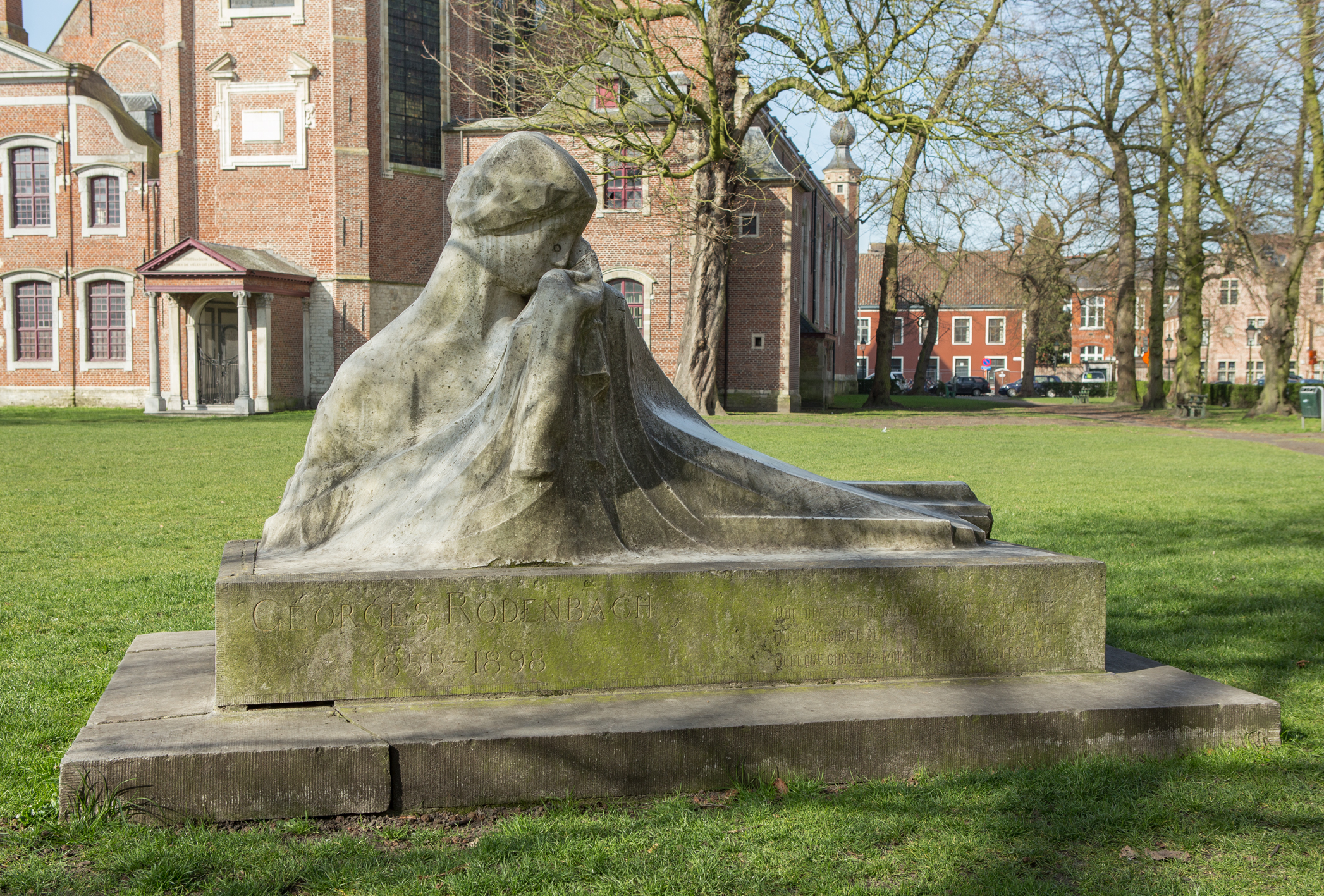 Begijnhofdries- Gent (Georges Minne - Georges Rodenbach)